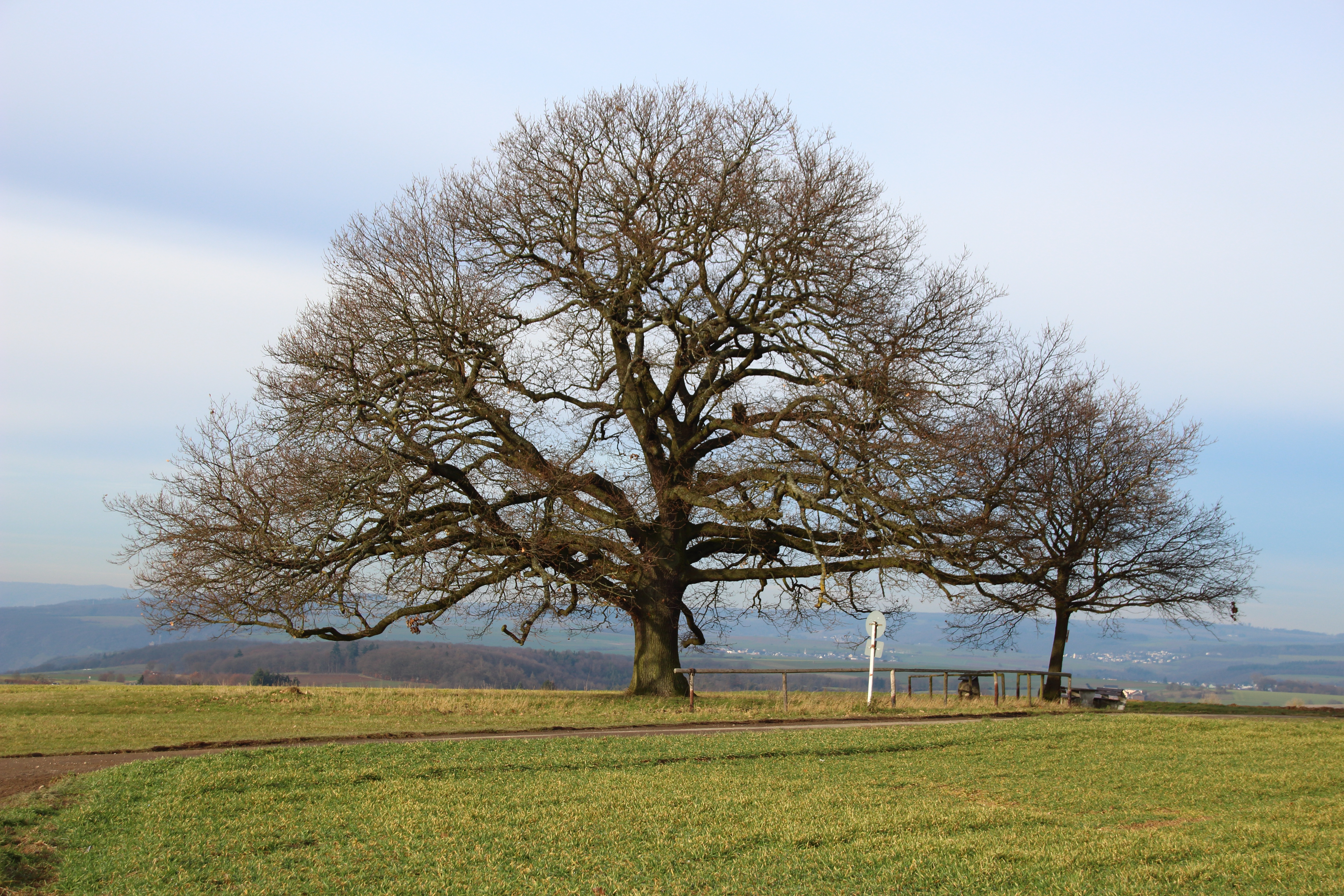 Naturdenkmal Adolfseiche (Quercus robur) bei Bornich, Rhein-Lahn-Kreis, ND-7141-385. Gepflanzt am 22. August 1864 von Bornicher Bürgern auf Veranlassung der 25-Jahr-Feier der Thronbesteigung des Herzogs Adolph von Nassau am 21. August 1839.